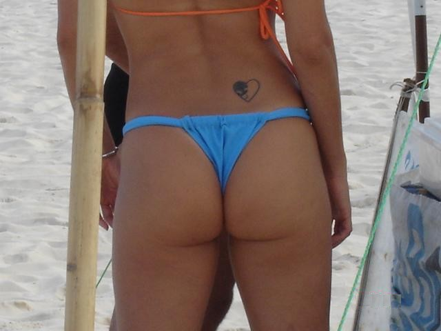 Blue bikini bottom, in wedgie.Garota / Argentina